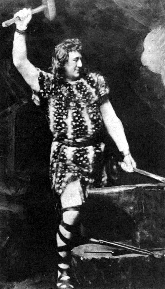 Siegfried (Heinrich Gudehus) schmiedet Notung